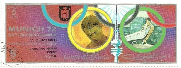 Viktor Klimenko (gymnast)